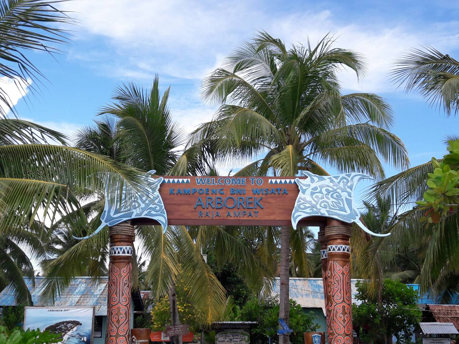 sambutan selamat datang yang berada di kampung arborek